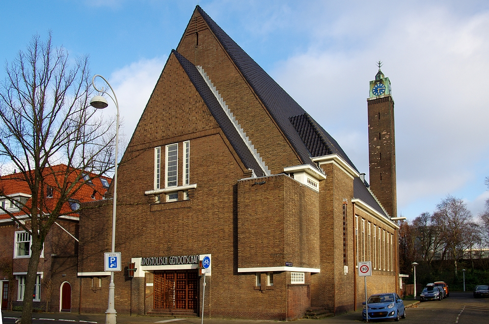 vereningingsgebouw Apostolisch Genootschap Watergraafsmeer, hoek galileïplantsoen / archimedesweg, amsterdamse school, apostolisch genootschap watergraafsmeer